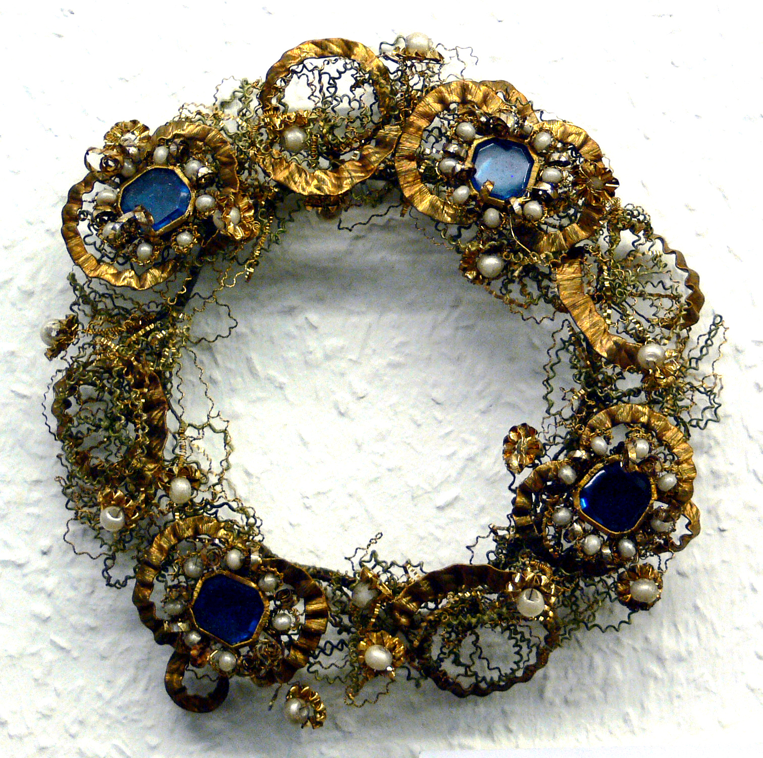 Weingarten, Museum für Klosterkultur Krone für das Goldene Professjubliäum, Bodenseegebiet um 1760, Drahtarbeiten, bunte Glassteine, Perlen